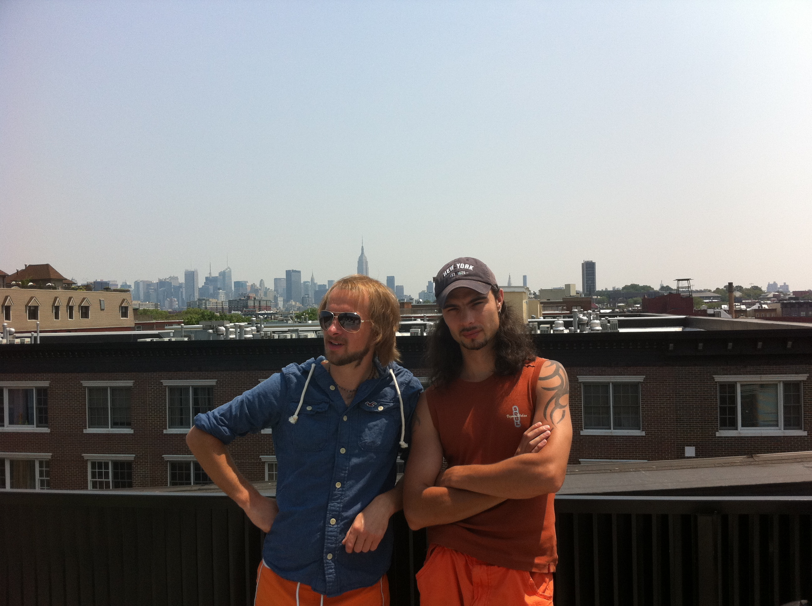 PanKe Shava American Tour